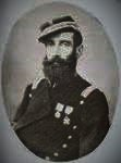 Marcos Segundo Maturana Molina nació en Santiago de Chile, el 15 de febrero de 1830 y falleció en la misma ciudad el 18 de mayo de 1892. Fue un militar y héroe de guerra chileno.